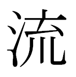 рю (иероглиф)